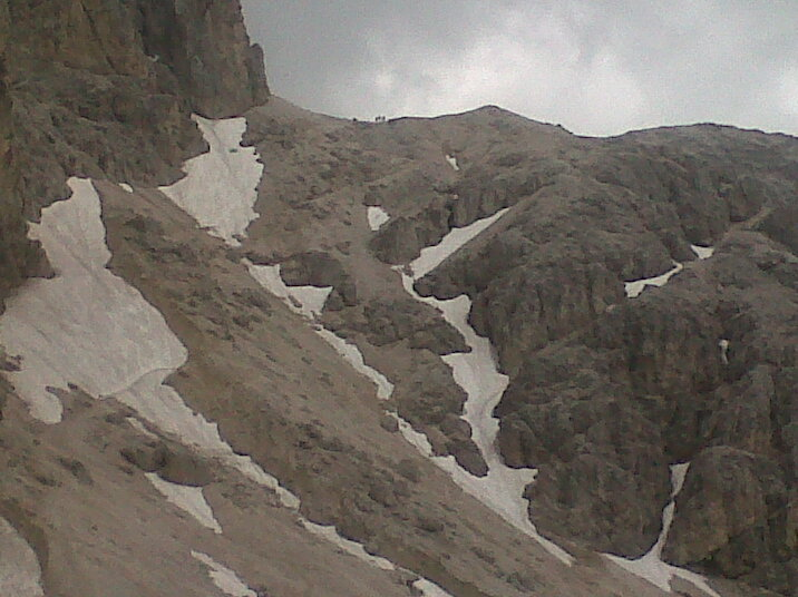 Passo di Antermoia (2800 m, Catinaccio) visto da Passo Principe.